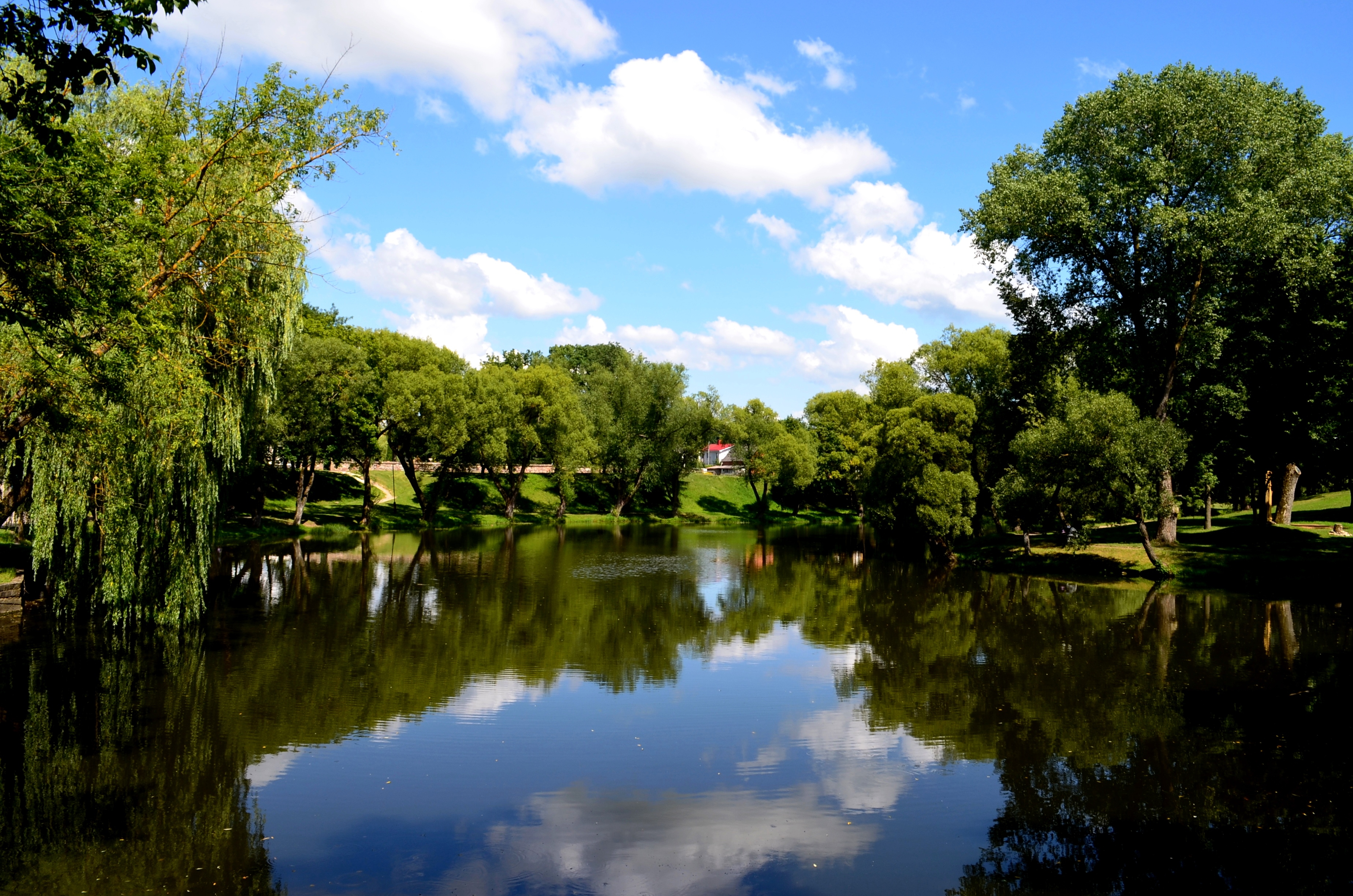 Kretingos vienuolyno tvenkinys